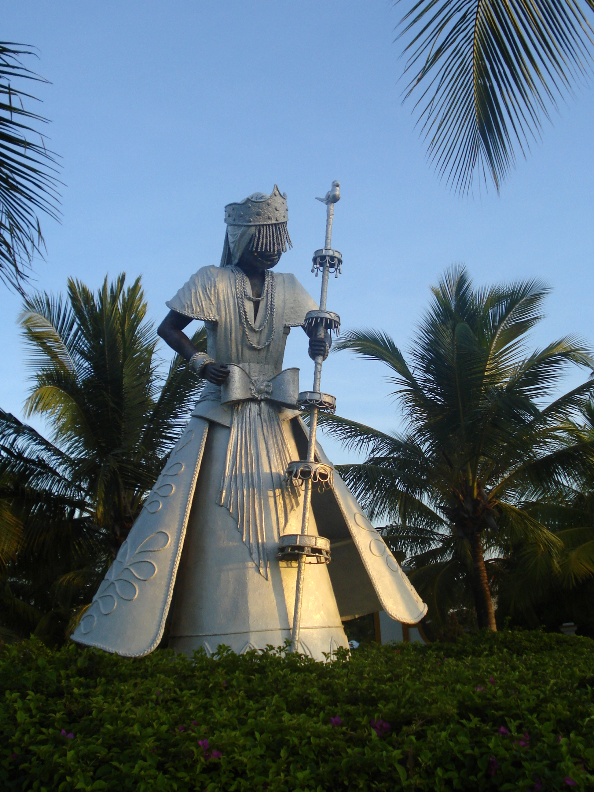 Estatua de Oxalá en Costa do Sauípe, Bahía, Brasil.